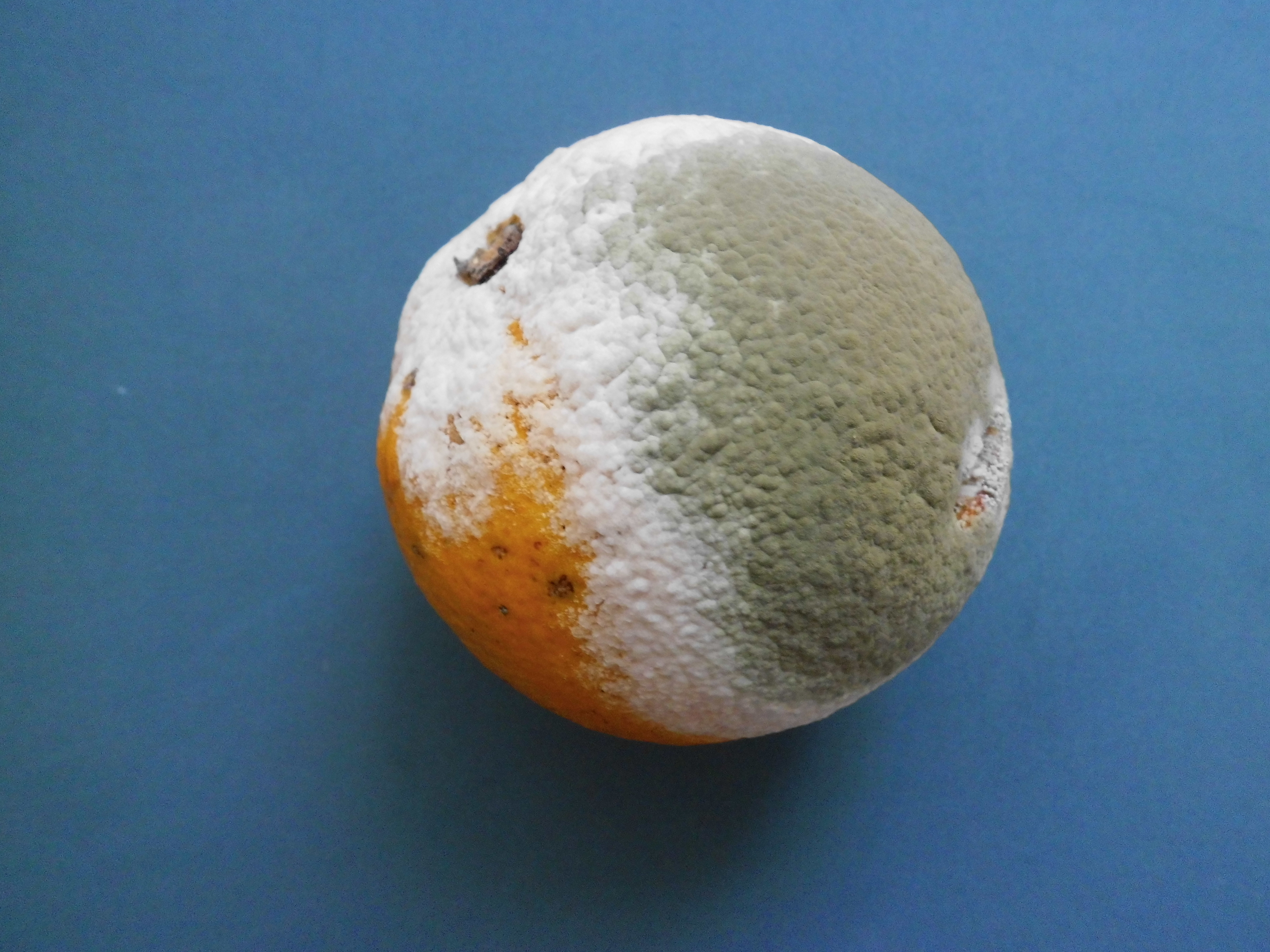 Citrus sinensis cubierta con moho (Botrytis cinerea) por descomposicion